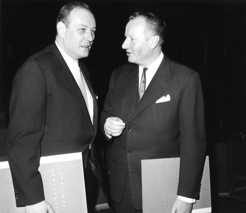 3.1.1964 Berlin/West v.l.n.r.: Walter Krüttner, Jürgen Neven-DuMont